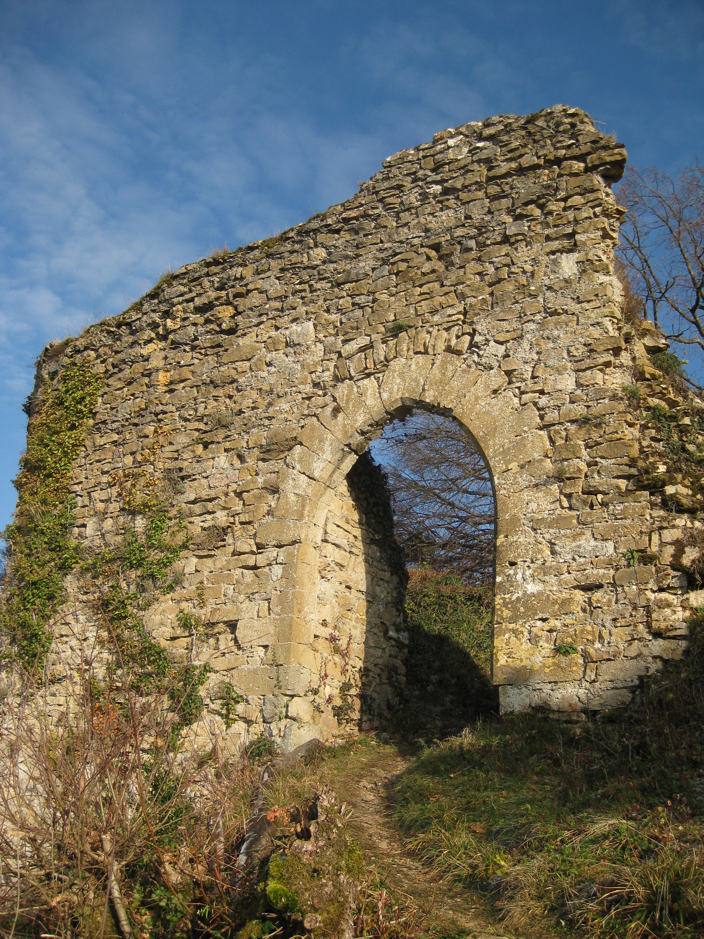 Porte ogivale édifiée par le comte de Savoie après la prise du château en 1321.